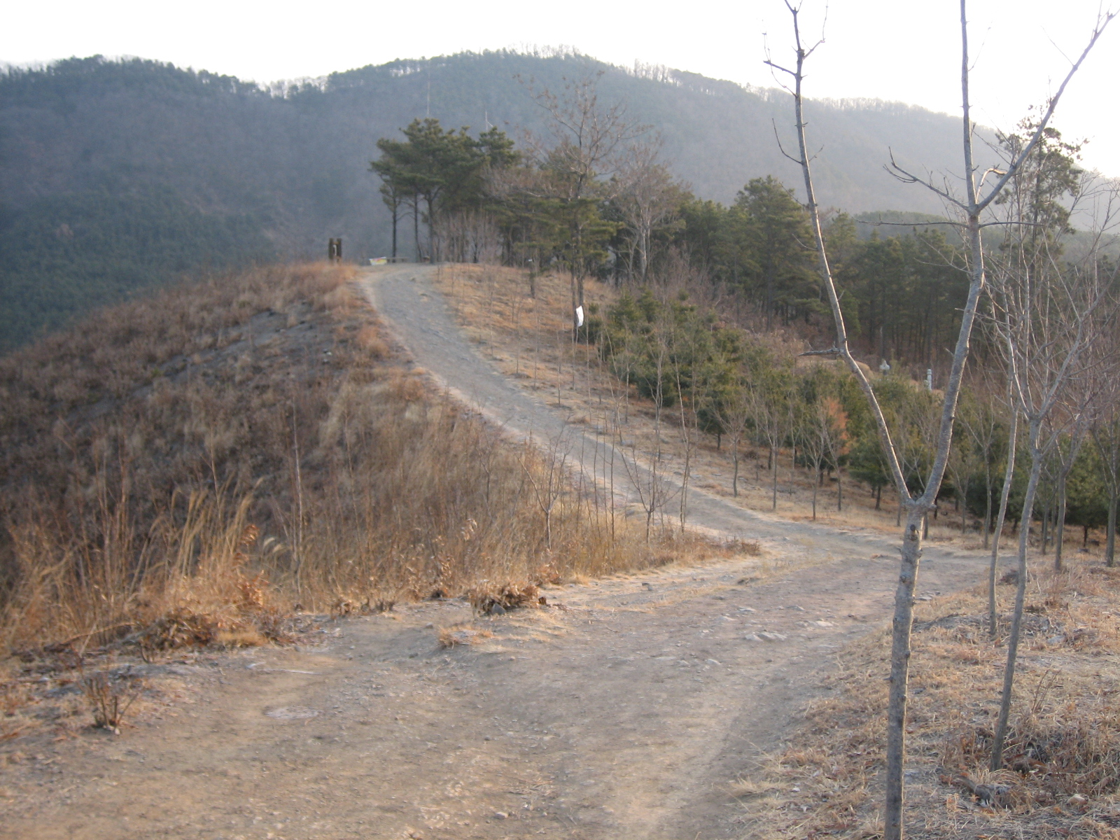 와룡산정상